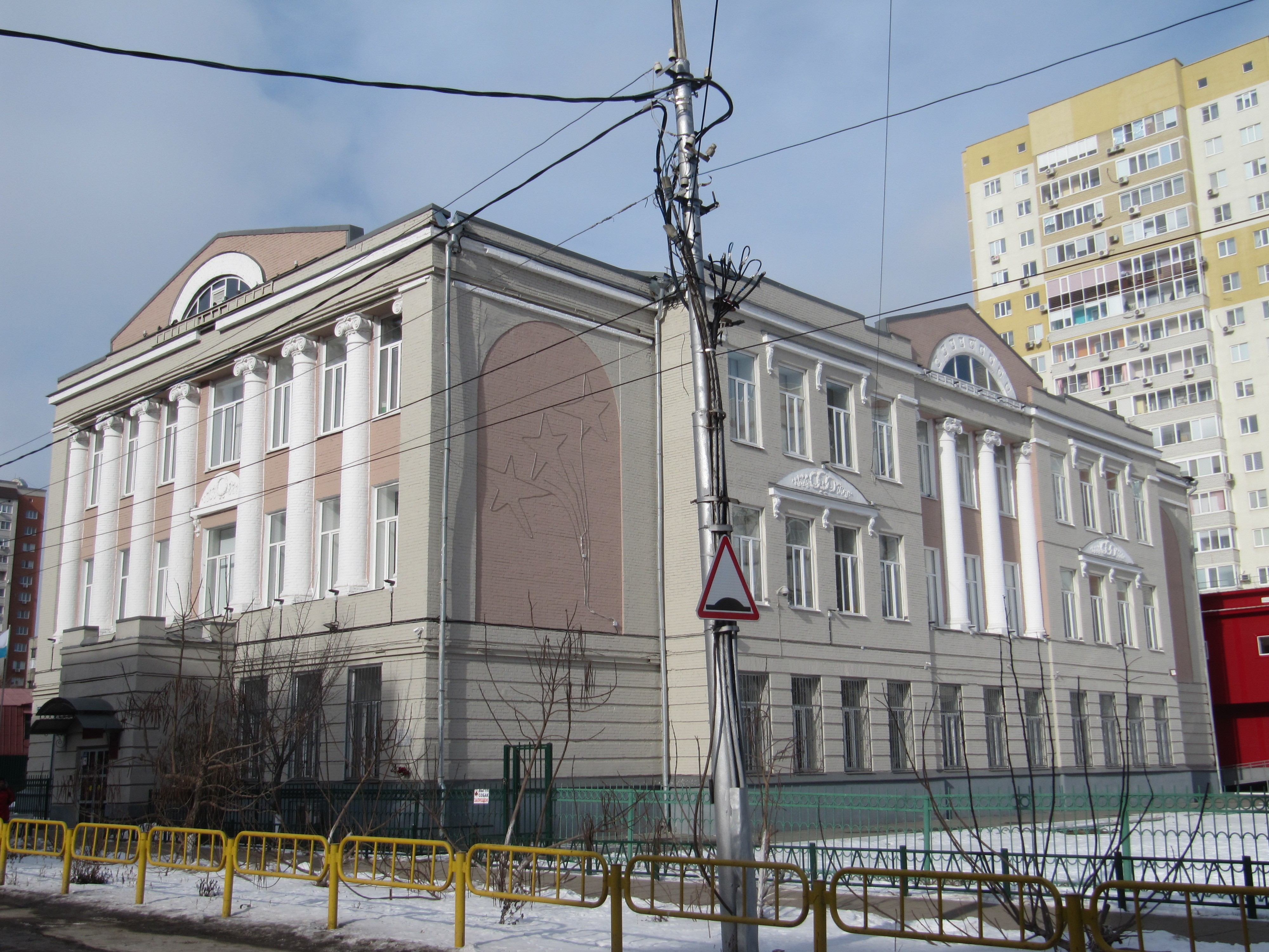 Лицей математики и информатики: ул. Посадского 246, угол ул. Рахова. Саратов. С 1954 по 1998 гг. — Средняя Школа № 21.